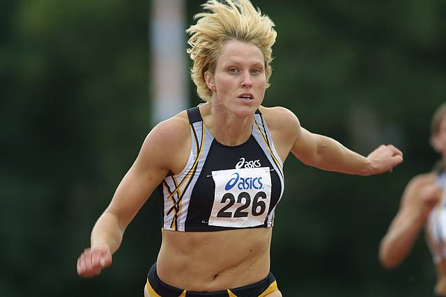 Jacqueline Poelman during a Gouden Spike Meeting in Leiden, The Netherlands